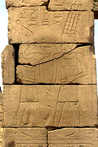 Relief représentant le pharaon Psammétique III - Chapelle des divines adoratrices Nitocris Ire et Ânkhnesnéferibrê à Karnak - XXVIe dynastie égyptienne